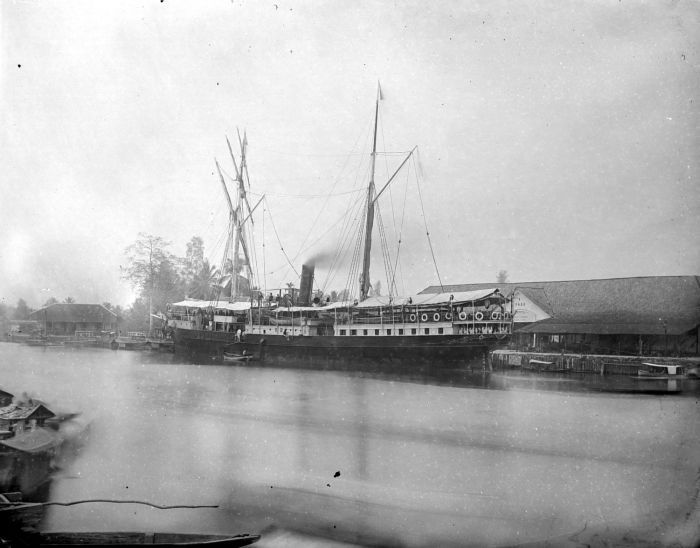 Negatief. Het schip de 'Franssen van de Putten'